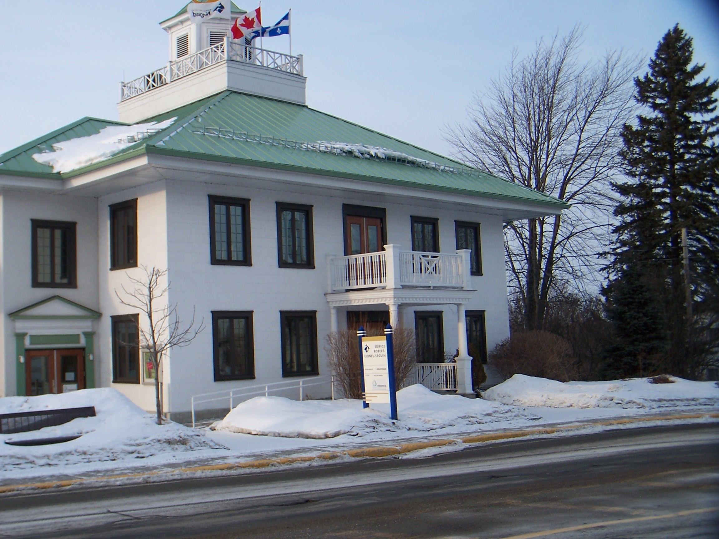 Bâtiment patrimonial, ancien hôtel de ville